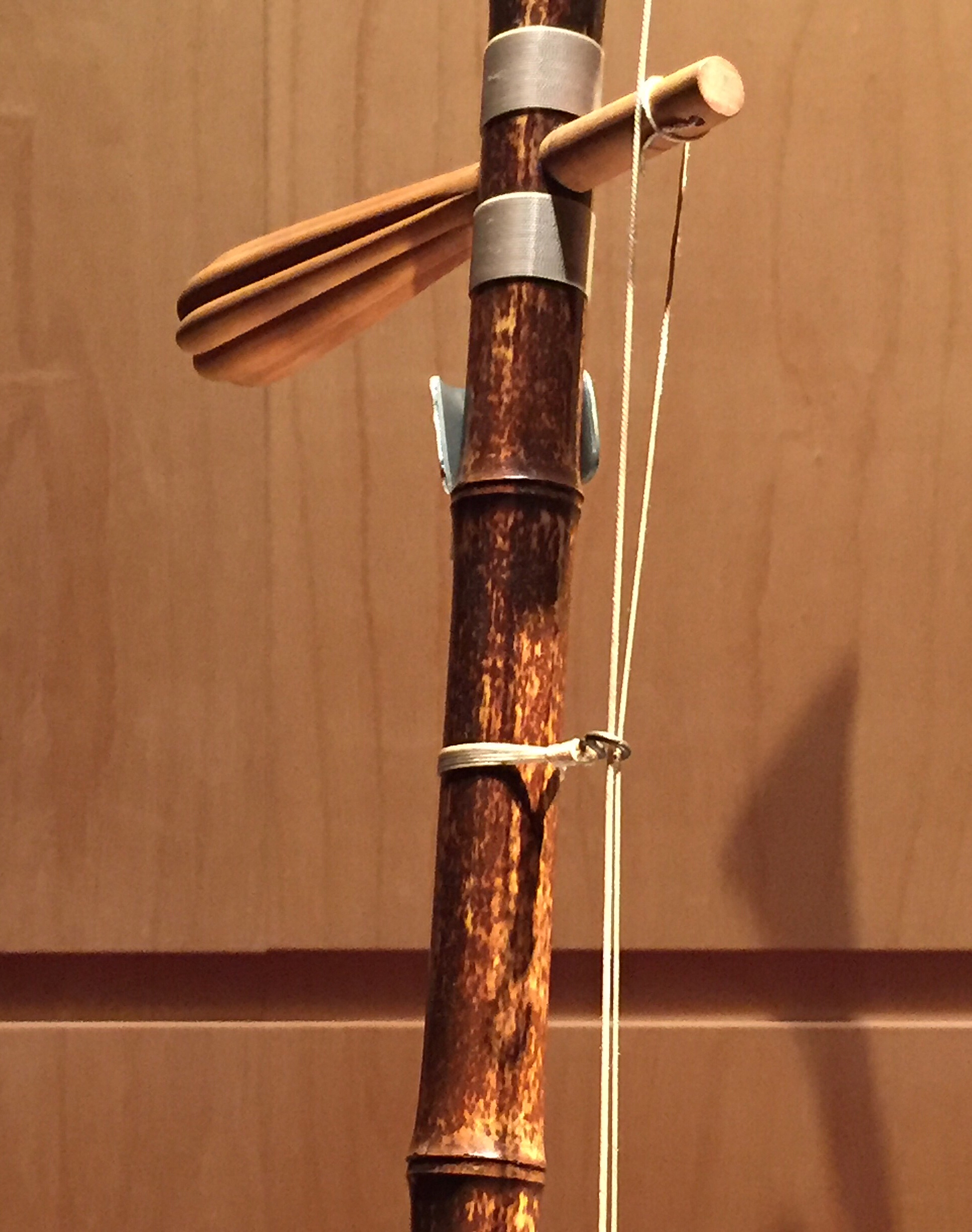 Rosca festa de tela amb un ganxo